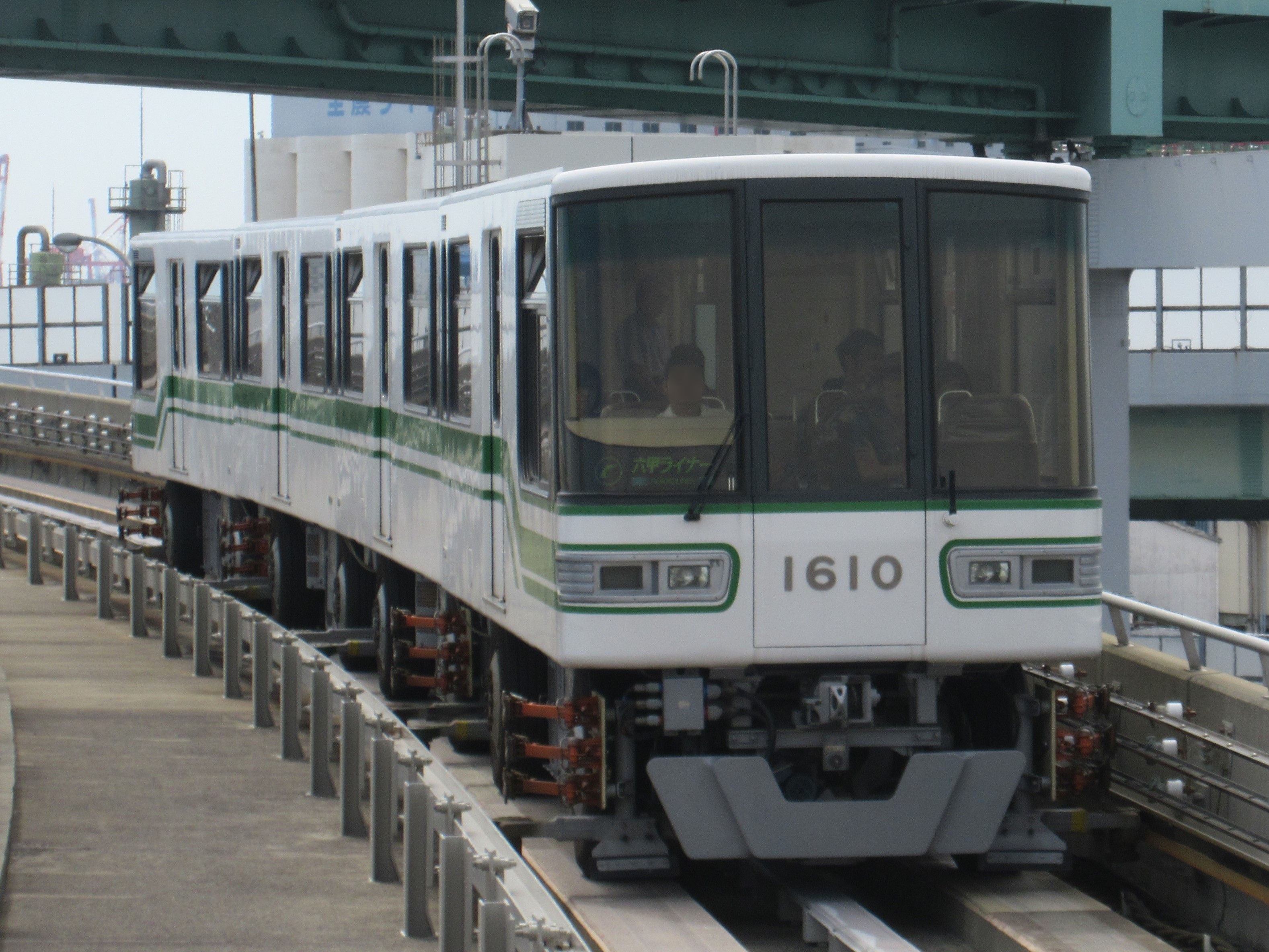 六甲ライナー1610 (南魚崎駅にて)